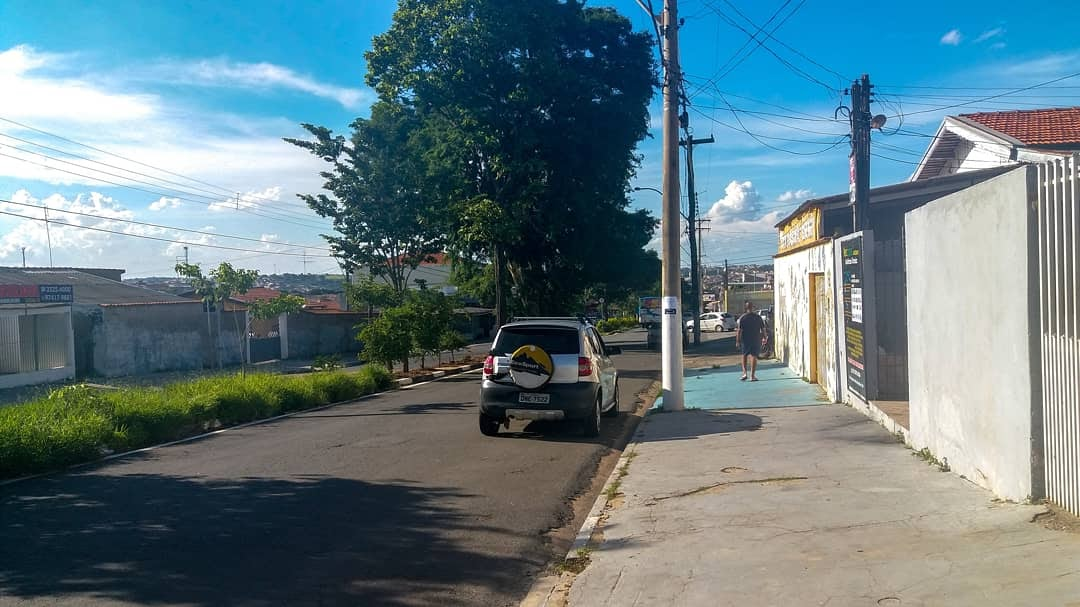 Foto na Avenida Itamarati em Mar/2019